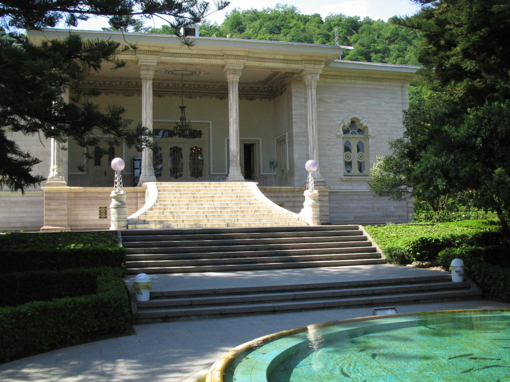 Shah Palace in Ramsar, Mazandaran, Iran.